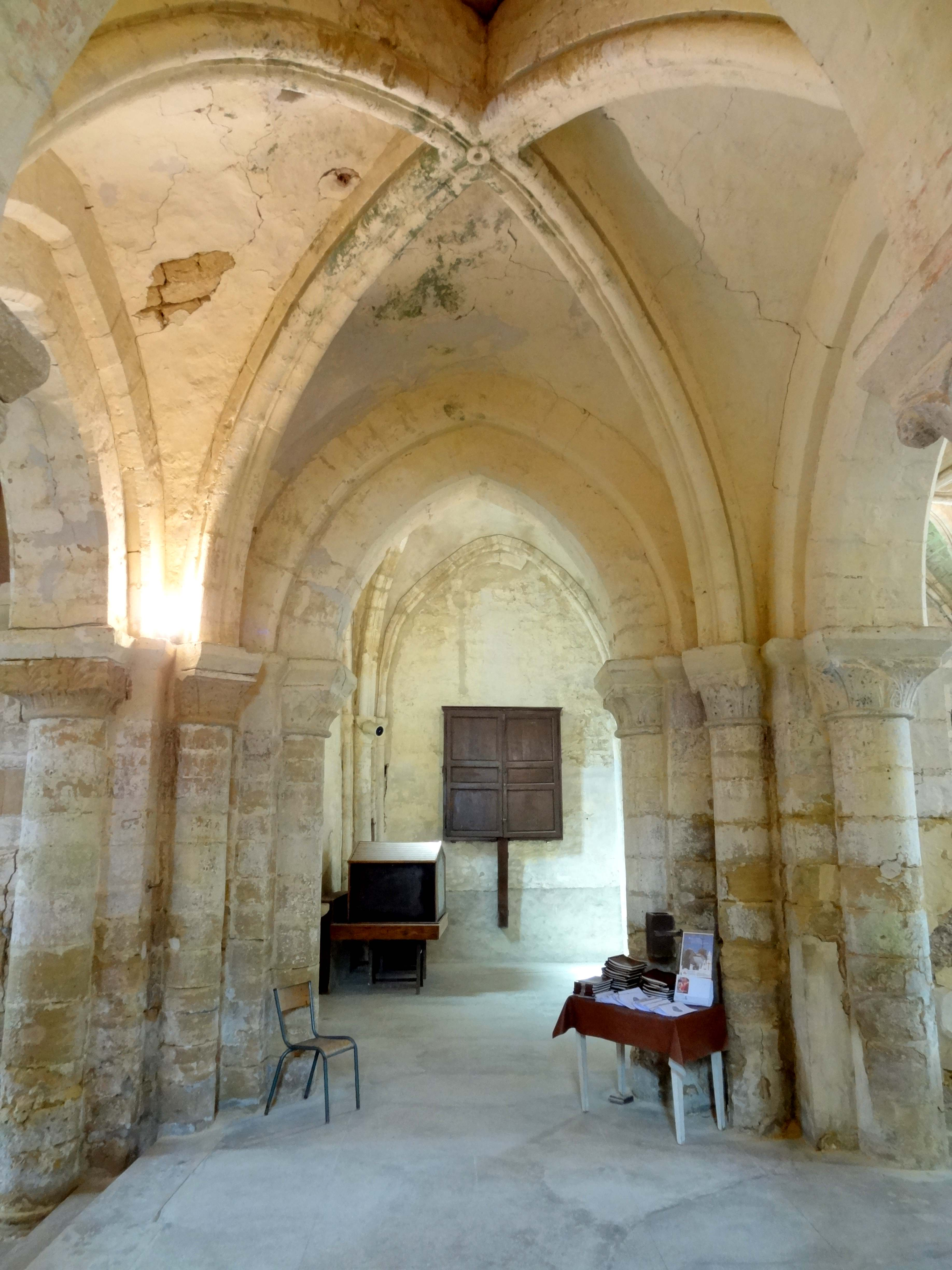 Intérieur de l'église - voir titre.